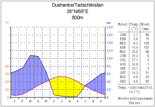 Klimadiagramm Dushanbe